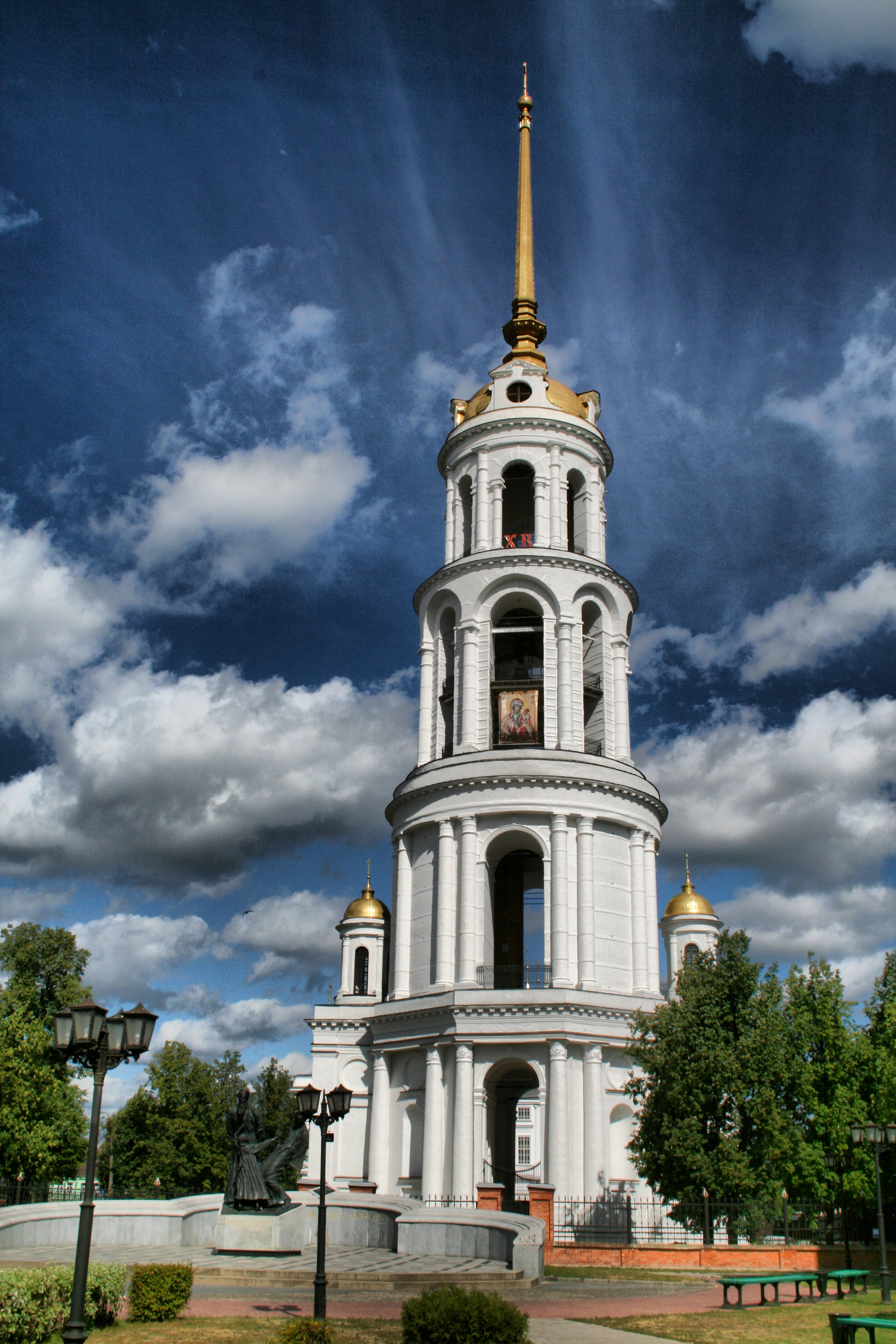 Ансамбль Воскресенской церкви: г. Шуя, Шуйский район, Ивановская область